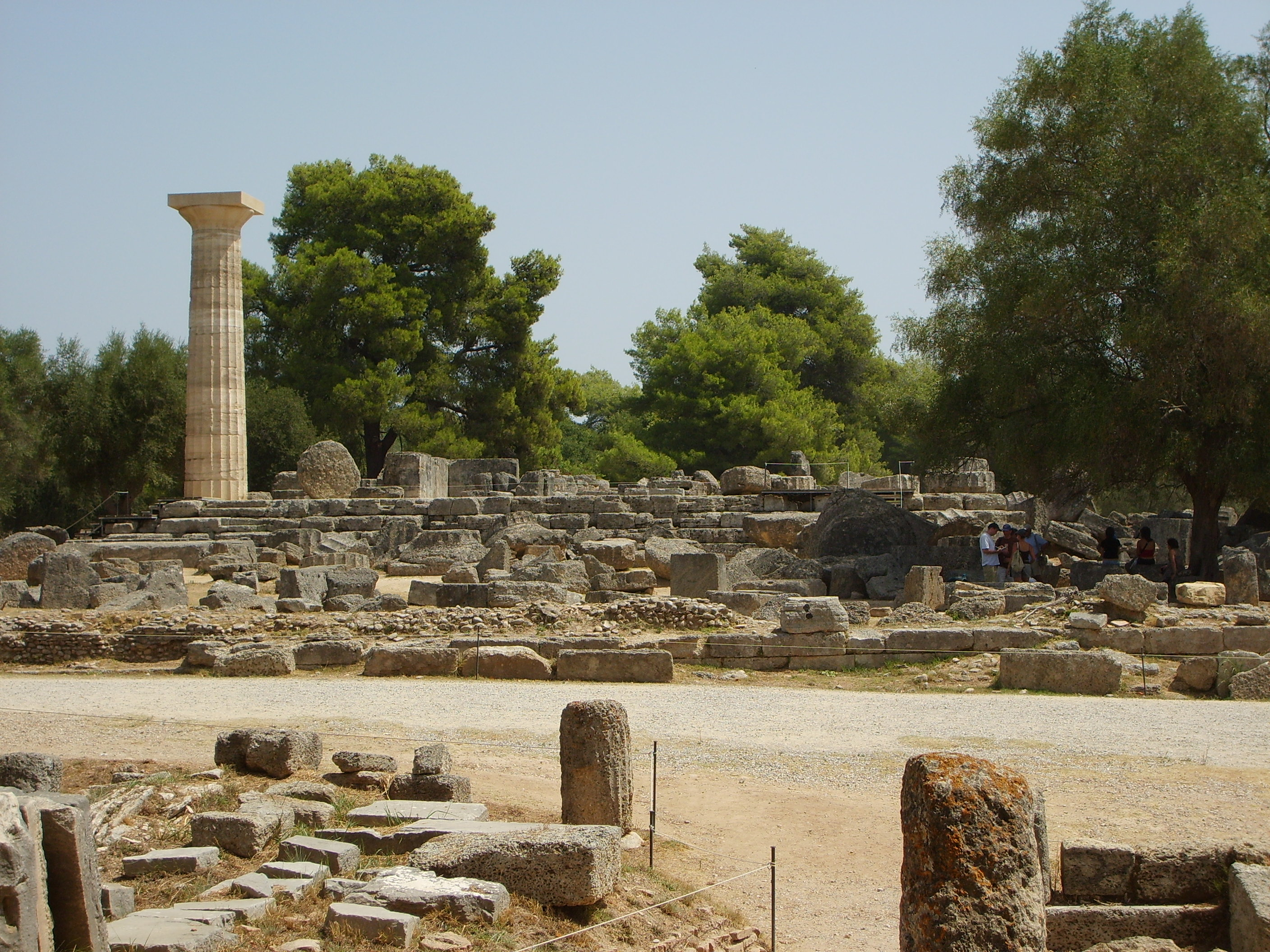 Ruines du Temple de Zeus à Olympie